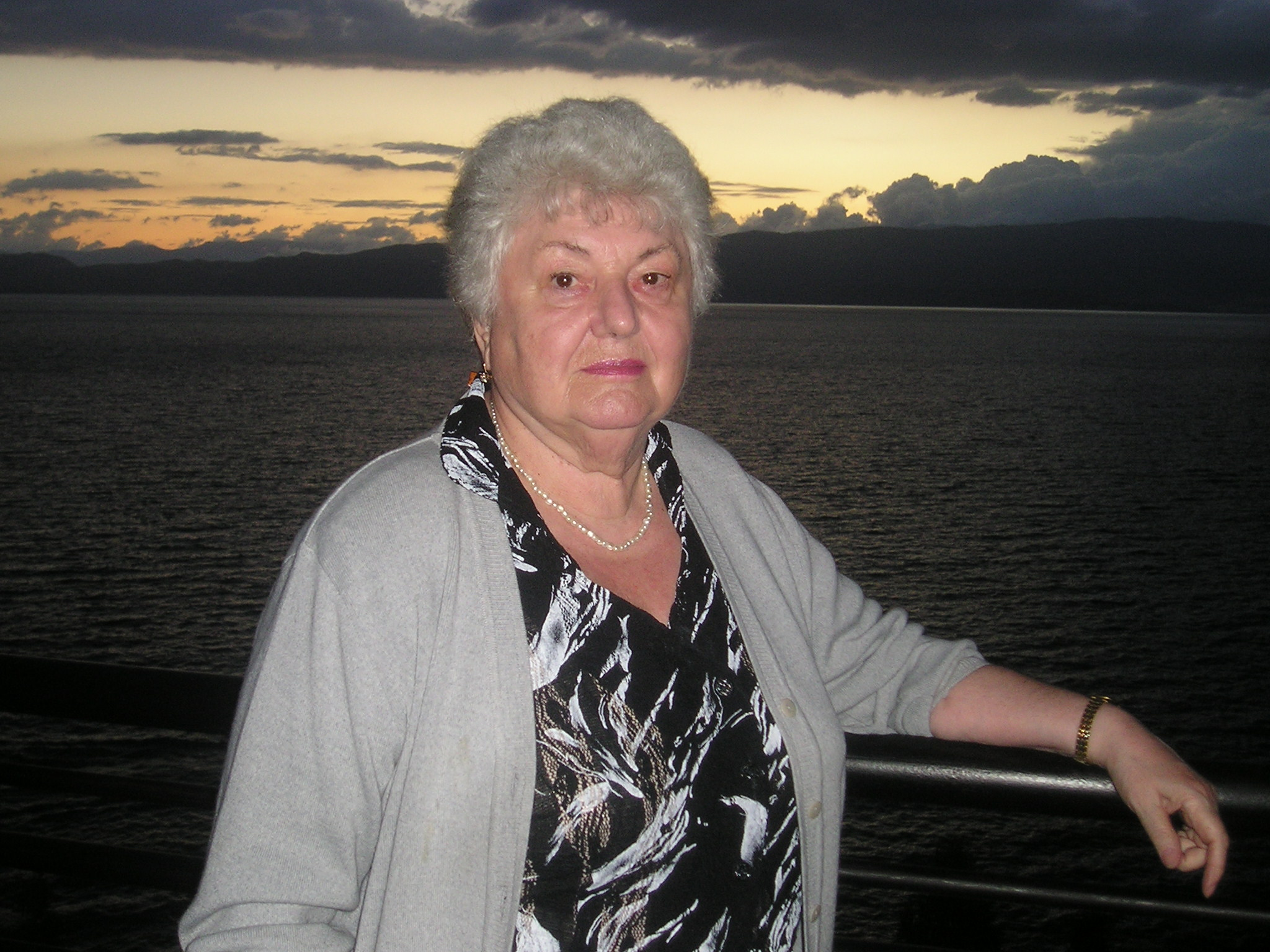 Портрет на Рина Усикова